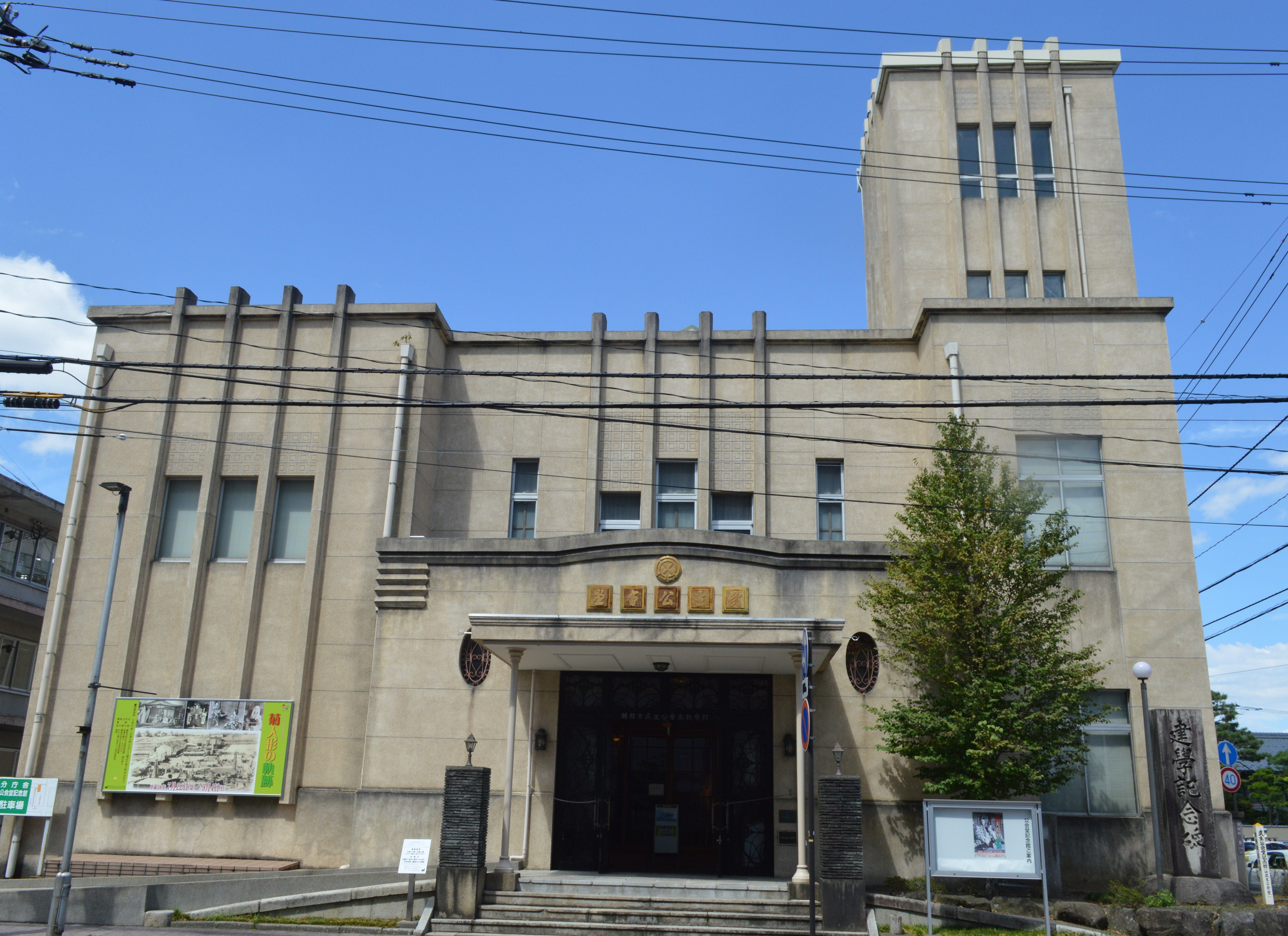 越前市武生公会堂記念館。藩校・立教館の跡地に、1929年に武生町公会堂として建設され、後に武生市公会堂となった。1933年から1955年までは武生町役場/武生市役所としても使用された。1990年に公会堂としての機能を停止し、1995年に武生市公会堂記念館となった。2005年に国の登録有形文化財に登録され、同年の自治体合併で越前市公会堂記念館となった。